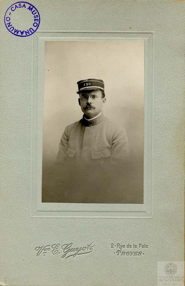 1 fot.; papel; imagen 10,6 x 16,3 cm. - Retrato. Hombre de uniforme. Maurice Legendre, hispanista fracés. Troyes. Francia. (Gelatina D. O. P. mate montada sobre cartulina, medida total 10,6 x 16,3. Sello troquelado del fotógrafo en margen inferior de cartulina: "Vve E. Guyot, 2 Rue de la Paix - Troyes" y en reverso: "Photographie artistique fondée en 1866. Médailees aux espositions de Troyes. Grand Prix 1904. Médlle d,or 1898. Diplôme d,honneur membre du Jury. Agrandissement inaltérables au charbon. E. Guyot, 2 rue de la Paix, téléphone 6-45, Troyes. Succursale à Bar sur Seine. Les clichés sont conservés. B. P. Grimaud - Paris"). - Procedencia: fondo Miguel de Unamuno